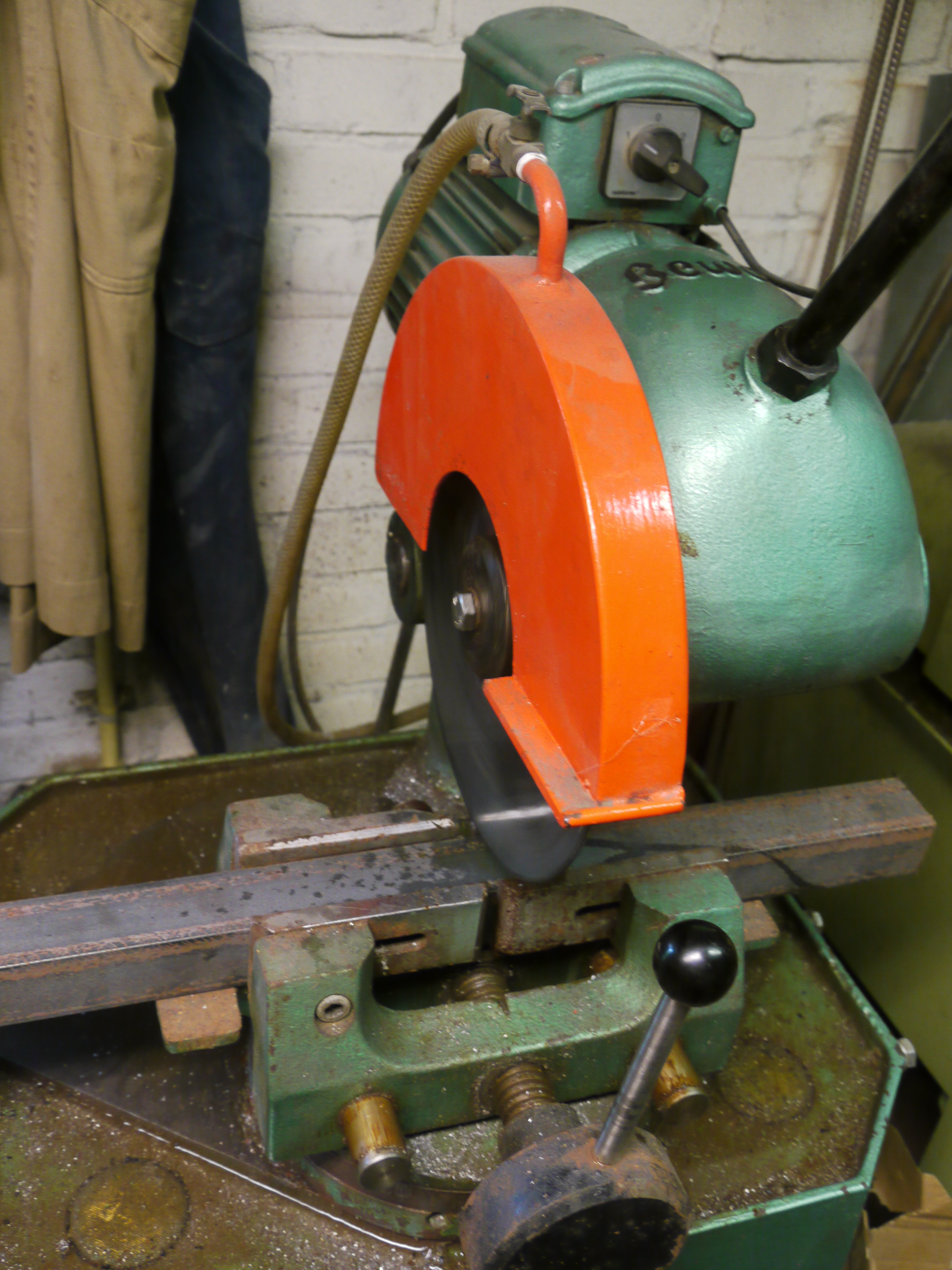 watergekoelde afkortzaag, merk BEWO, bestemd voor het zagen van metaal.